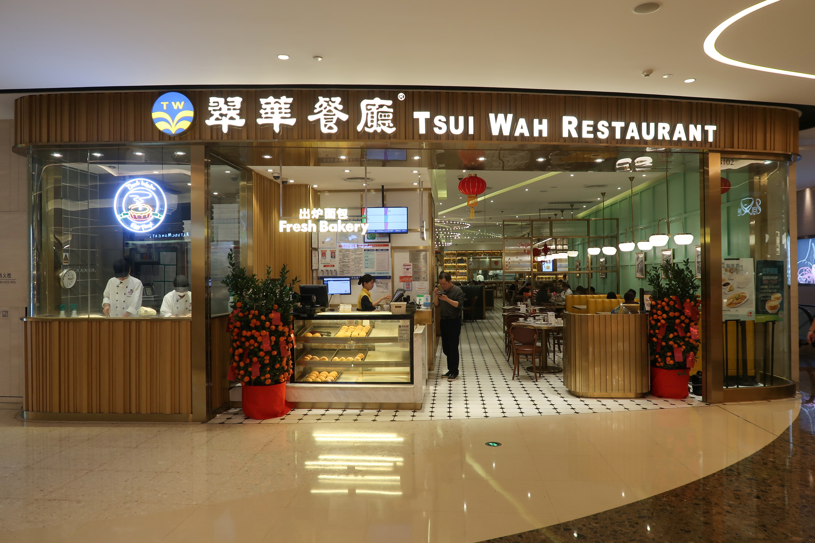 Tsui Wah Restaurant in IGC Guanzhou